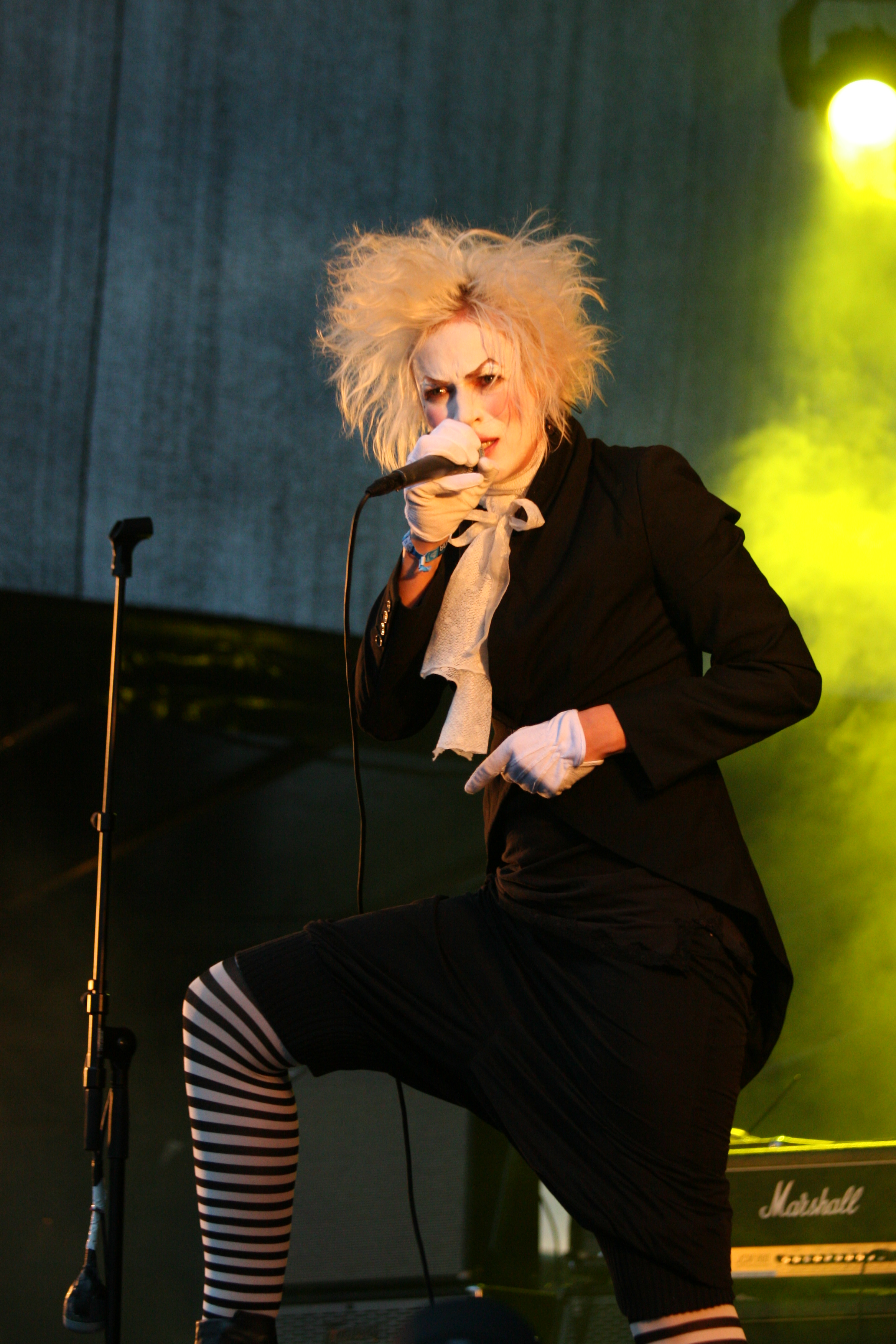 Agnete Maria Forfang Kjølsrud i Animal Alpha under konsert på Vinjerock i 2008